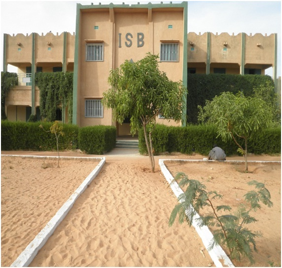 Institut de Santé Bouzou Dan Zambadi